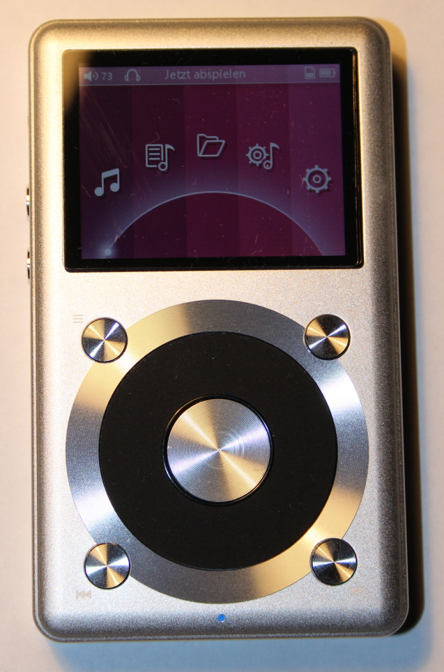 FiiO X1-Music Player